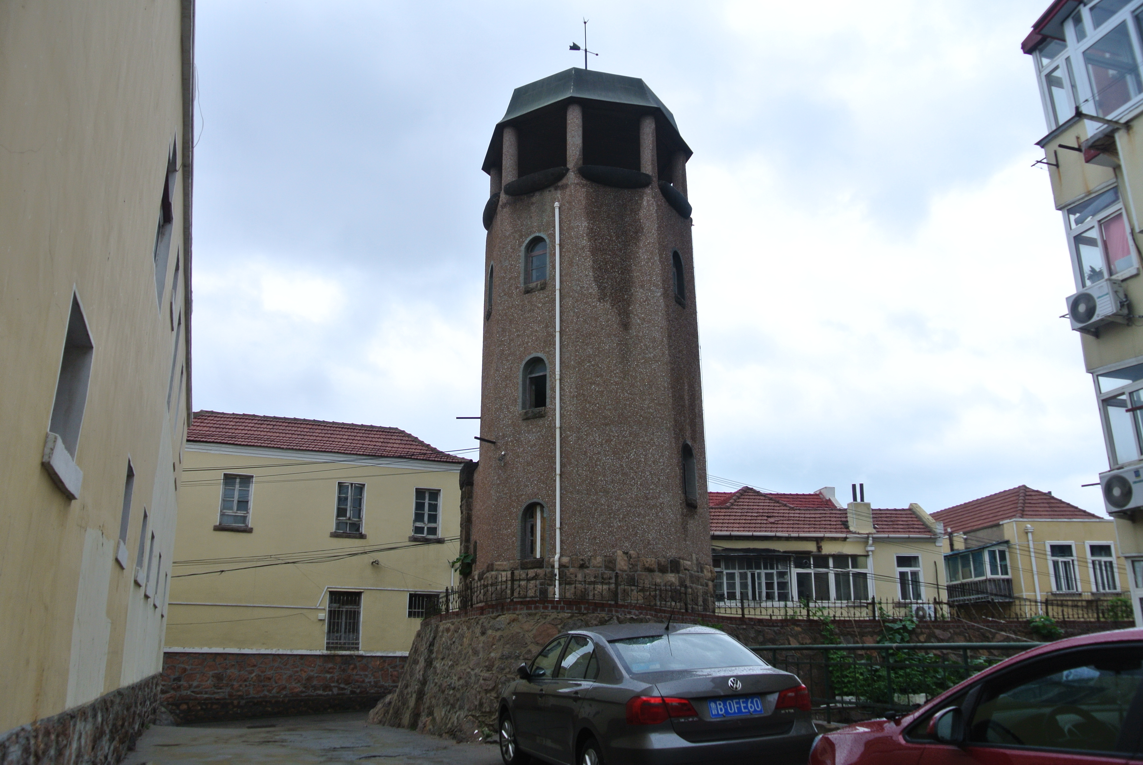 青岛望火楼背面